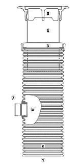 Plastikinio šulinio konstrukcija